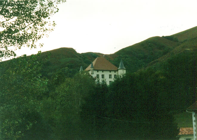 Chateau "Etxauz" à Saint-Étienne-de-Baïgorry Pyrénées-Atlantiques).